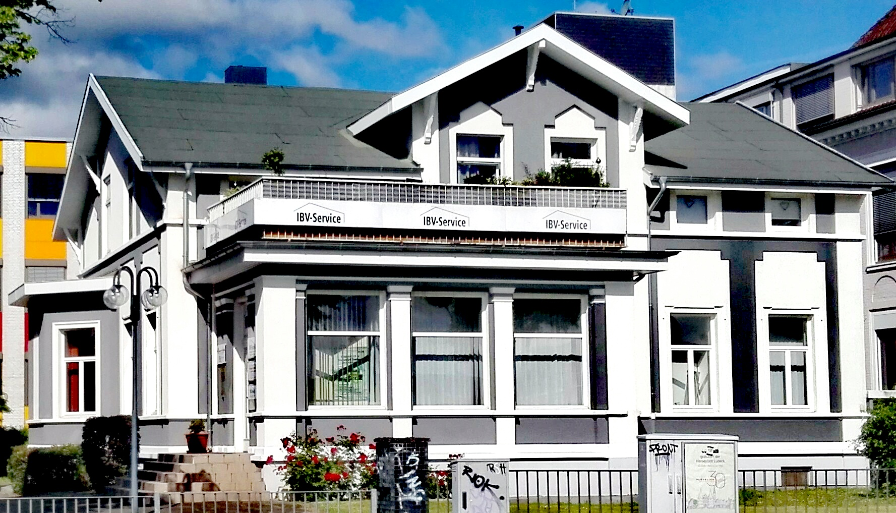 Ehemaliges Haus von Rudolf Thiel auf dem einstigen Fabrikgelände.